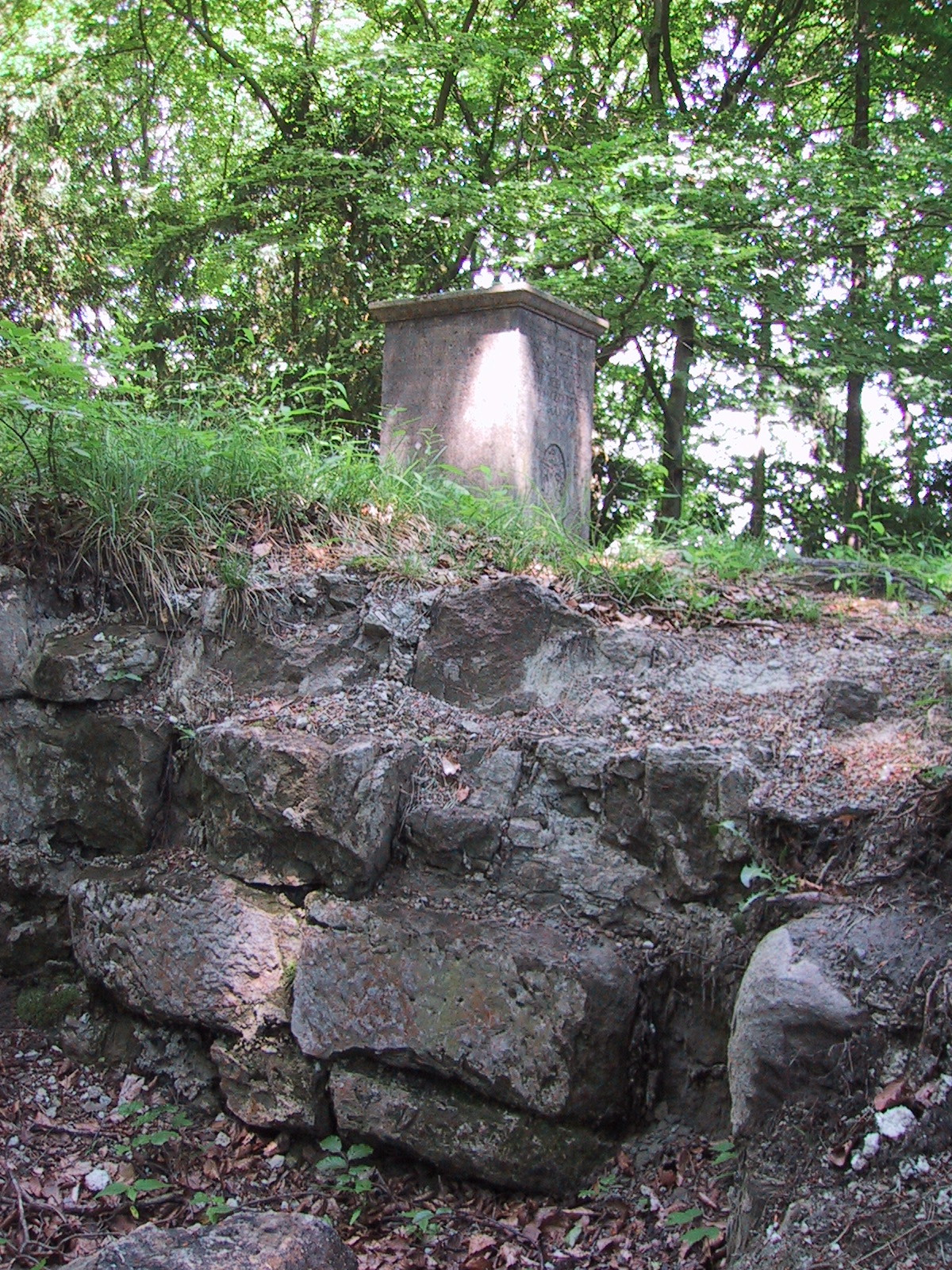 Ruine Burg Manegg, Leimbach.